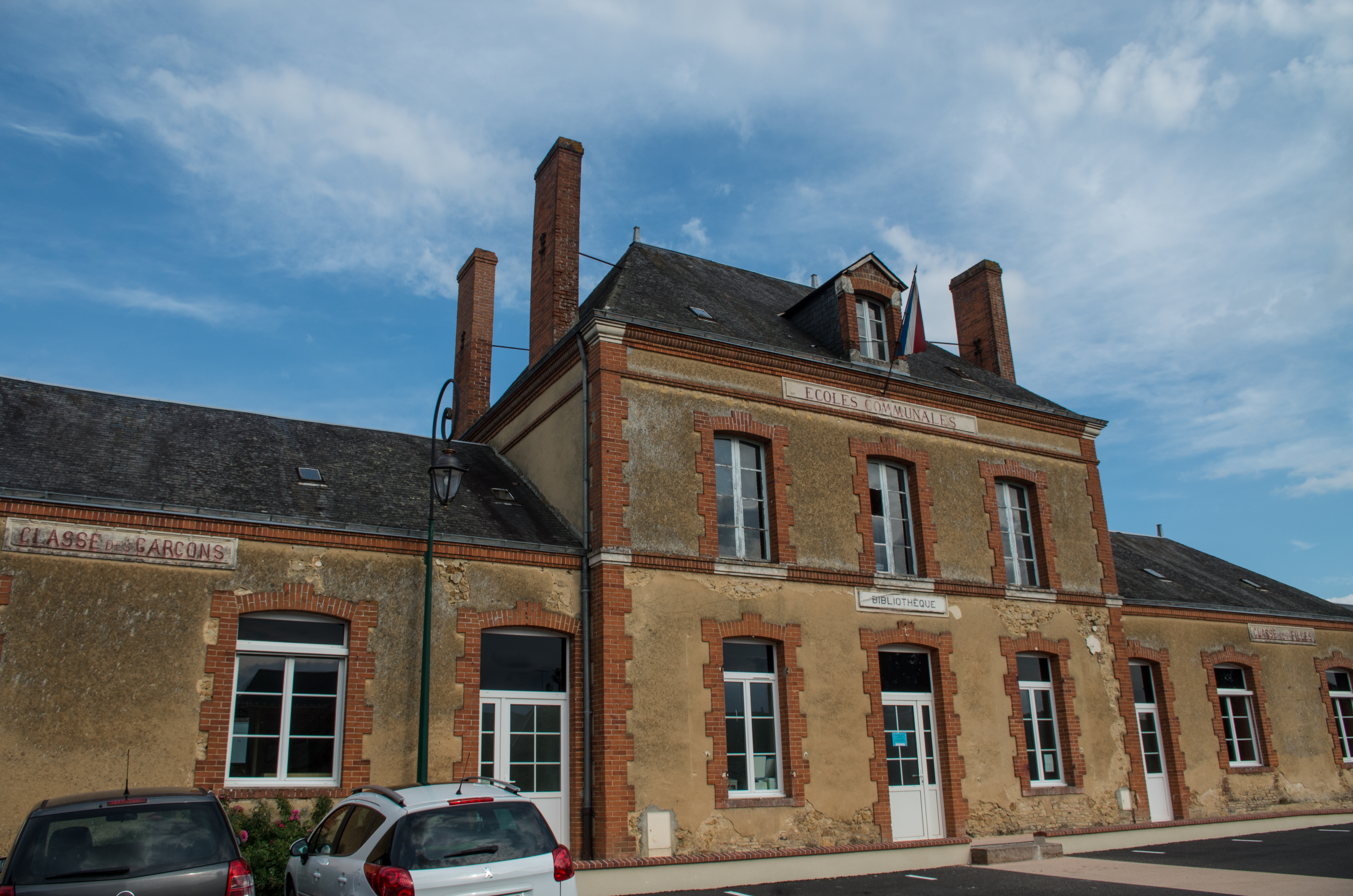 Façade des écoles communales de Semur-en-Vallon